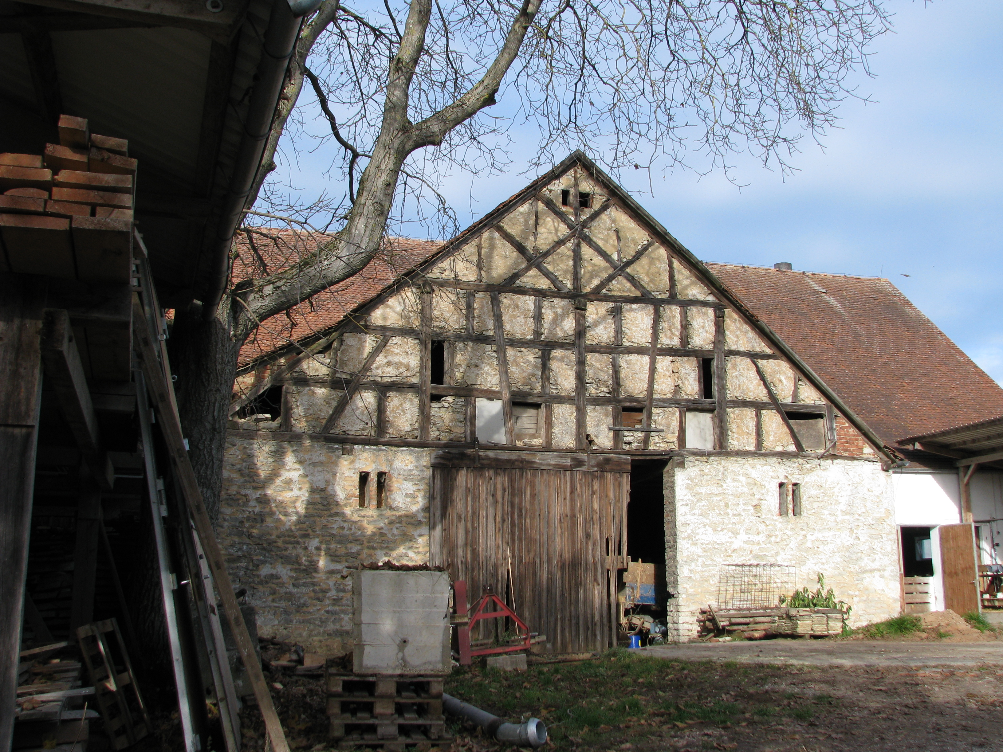 Ruppmannsburg, Ortsteil von Thalmässing im mittelfränkischen Landkreis Roth, historischer Fachwerkstadel